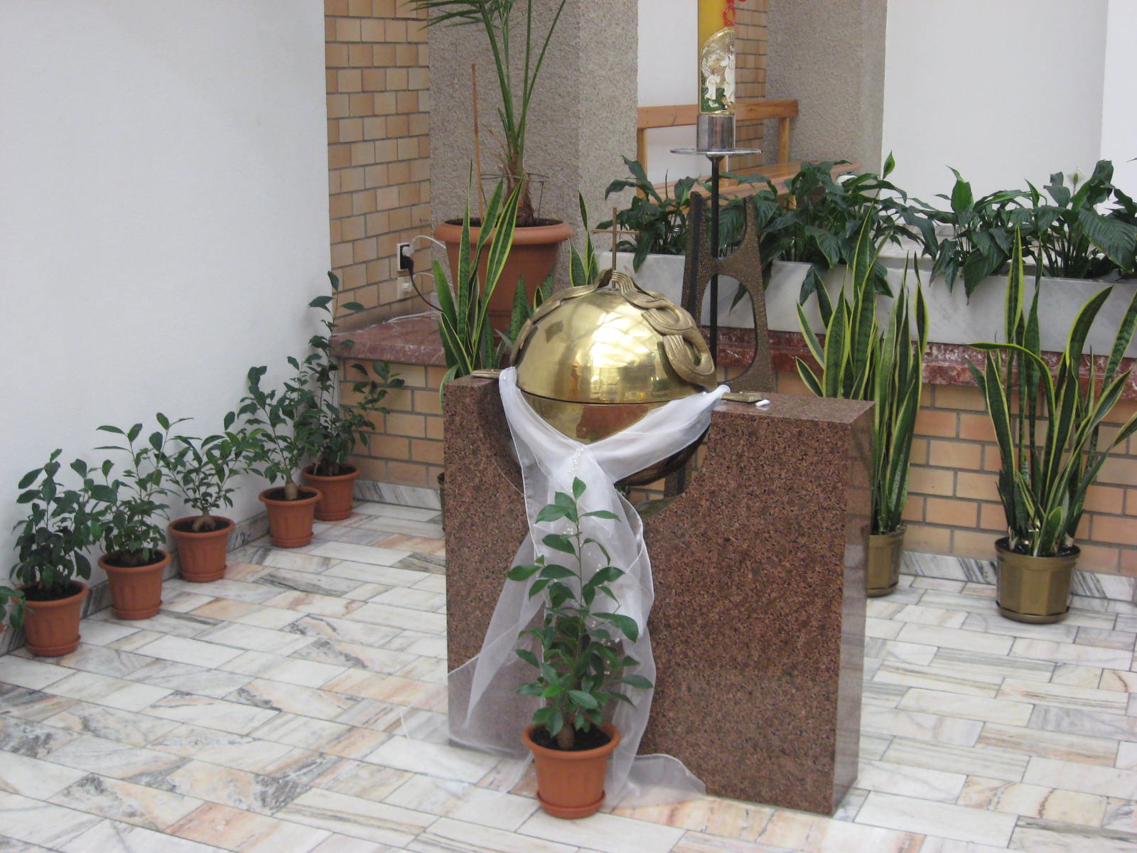 Chrzcielnica